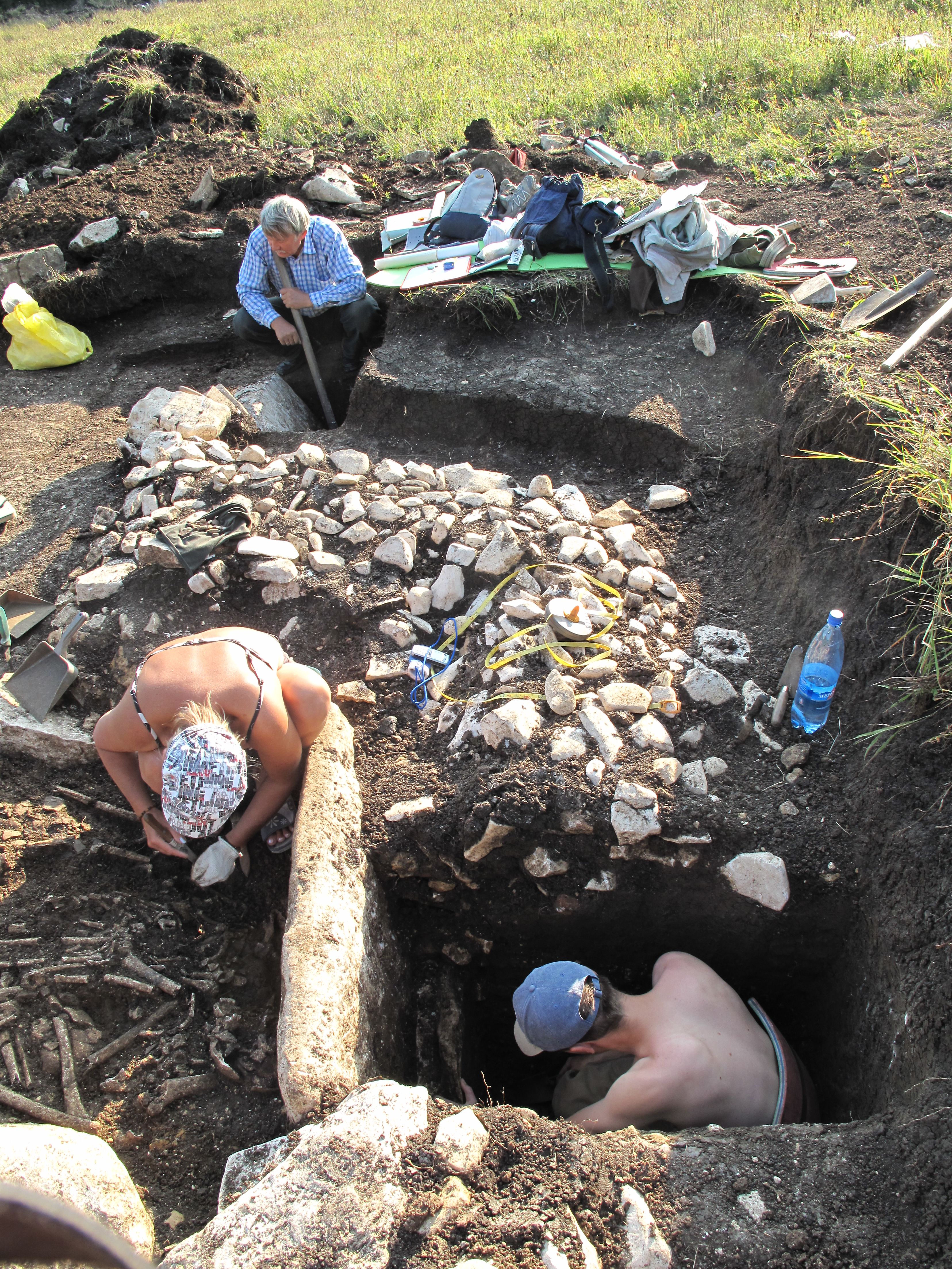 Майкопская археологическая экспедиция под руководством А. Д. Резепкина на раскопках дольменной группы «Тумасово» (шушукские дольмены) под ст. Веселая (Адыгея, РФ). 2009 г.